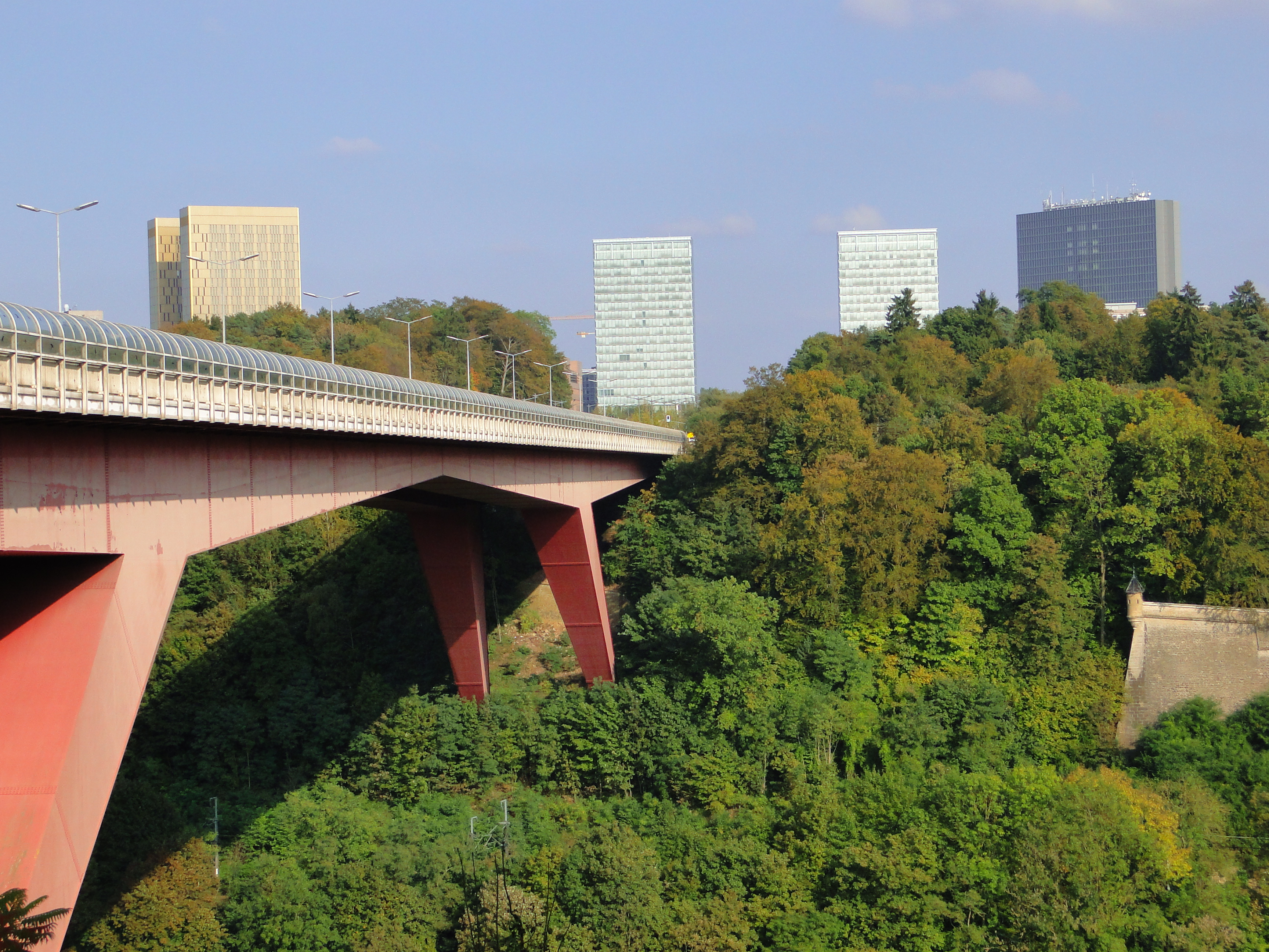 Le Pont Grande-Duchese Charlotte, vue depuis le Limpertsberg vers l'est, en direction du plateau de Kirchberg. Au fond, de gauche à droite, les tours A et B de la Cour de justice de l'Union européenne, les tours B et A (secrétariat du Parlement Européen) ainsi que le bâtiment Konrad Adenauer. A l'extrémité droite, une tour du Fort Niedergrünewald.